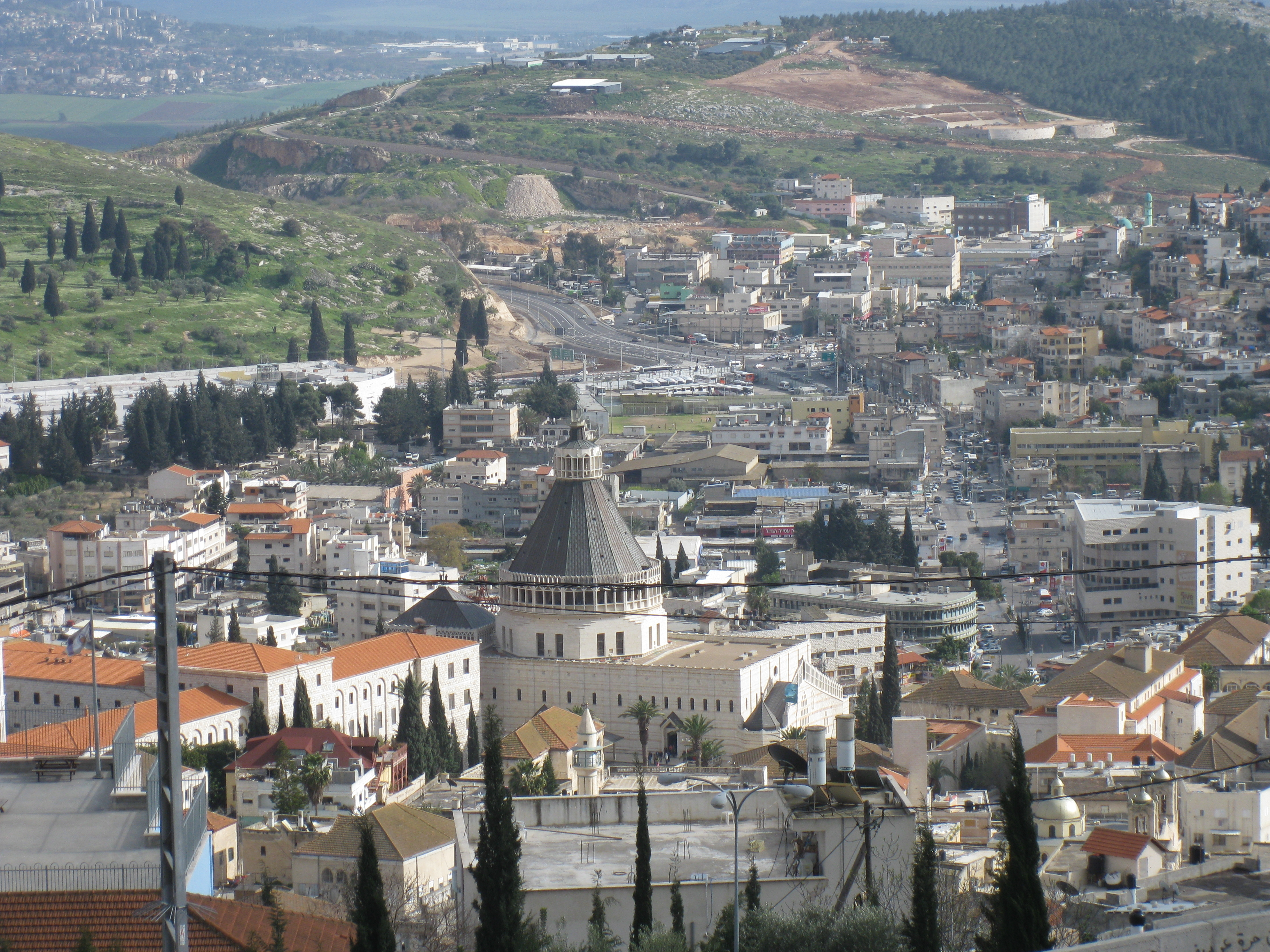 Views of Nazareth מבט פנורמי על נצרת